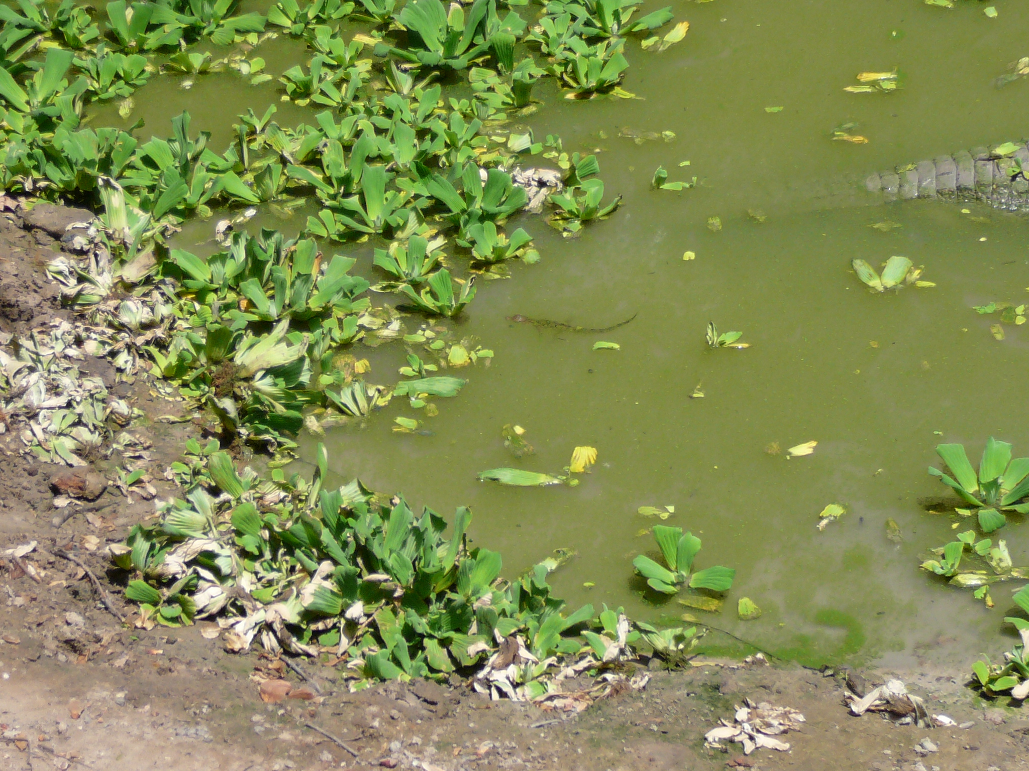 Pistia stratiotes